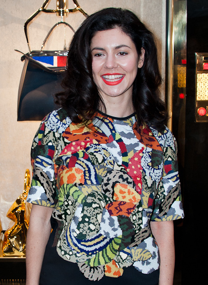 Fendi store opening - Marina Lambrini Diamandis